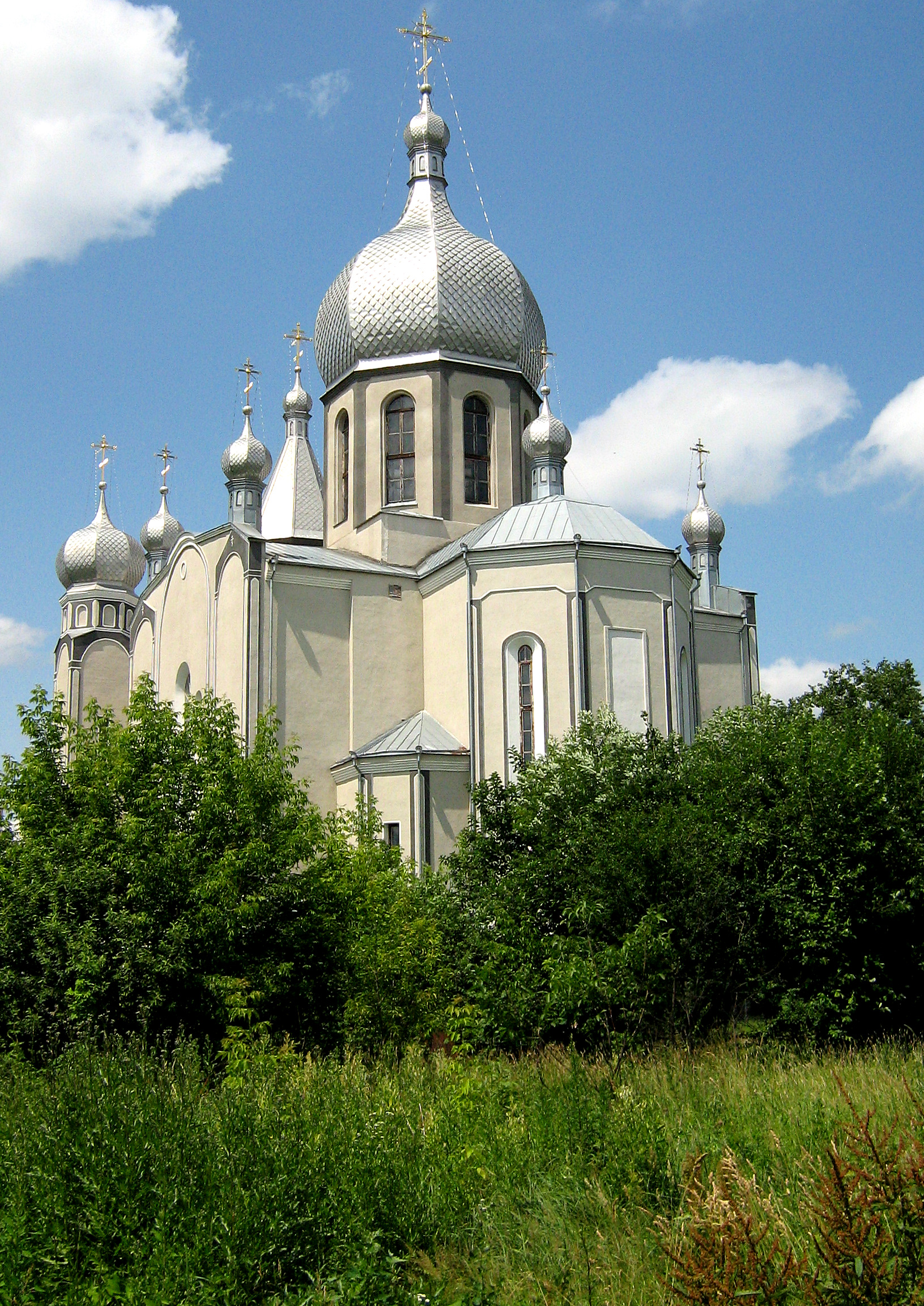 Будівля церкви московського патріархату